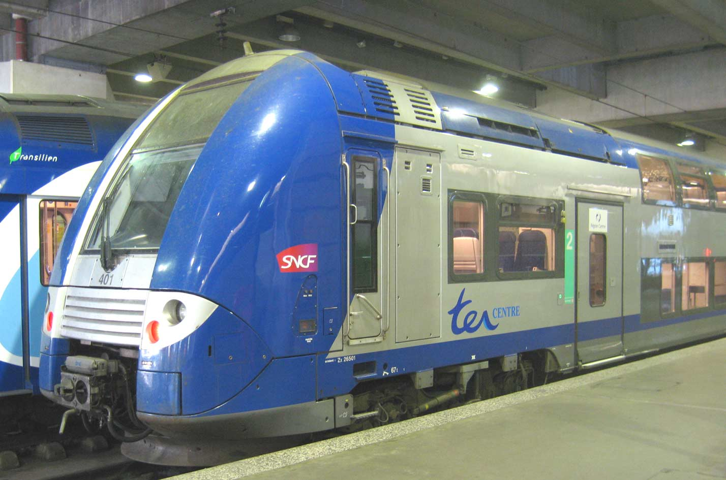 Automotrice SNCF de la serie Z 26500 a la gare Montparnasse Rame 26501 de la région Centre Lieu : Paris, France Date : Juin 2006 Auteur : Pline photo personnelle